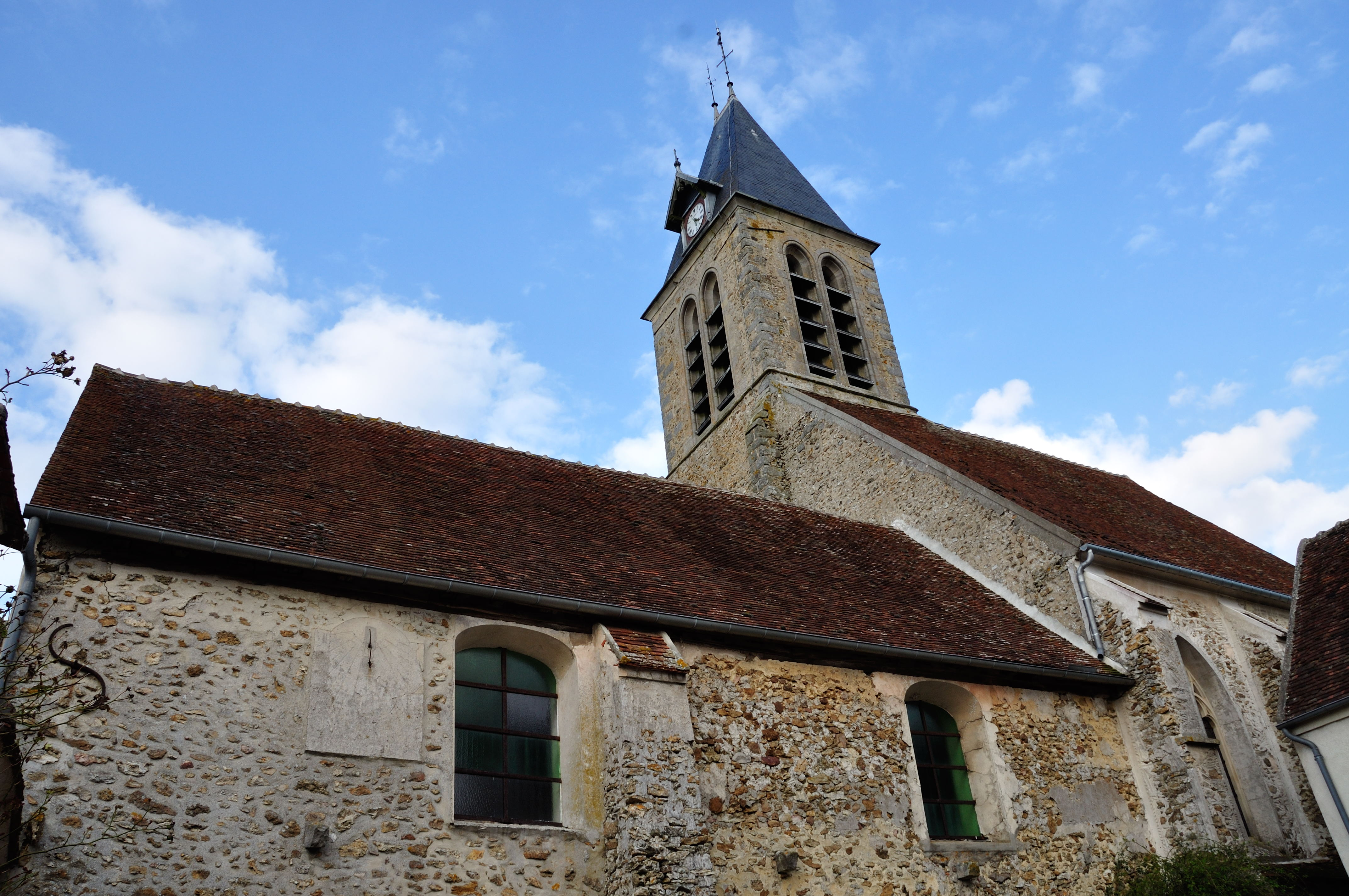 Église Notre-Dame-de-l'Assomption d'Aulnoy. (Seine-et-Marne, région Île-de-France).